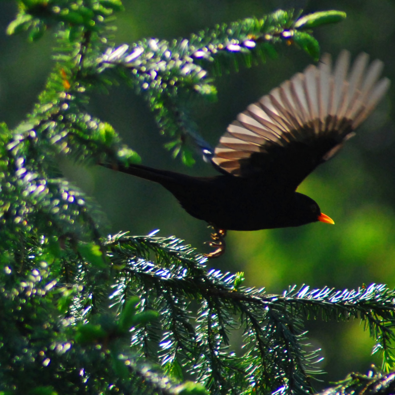 Nobody escapes lucky Bogenfreund... ;-) Turdus merula